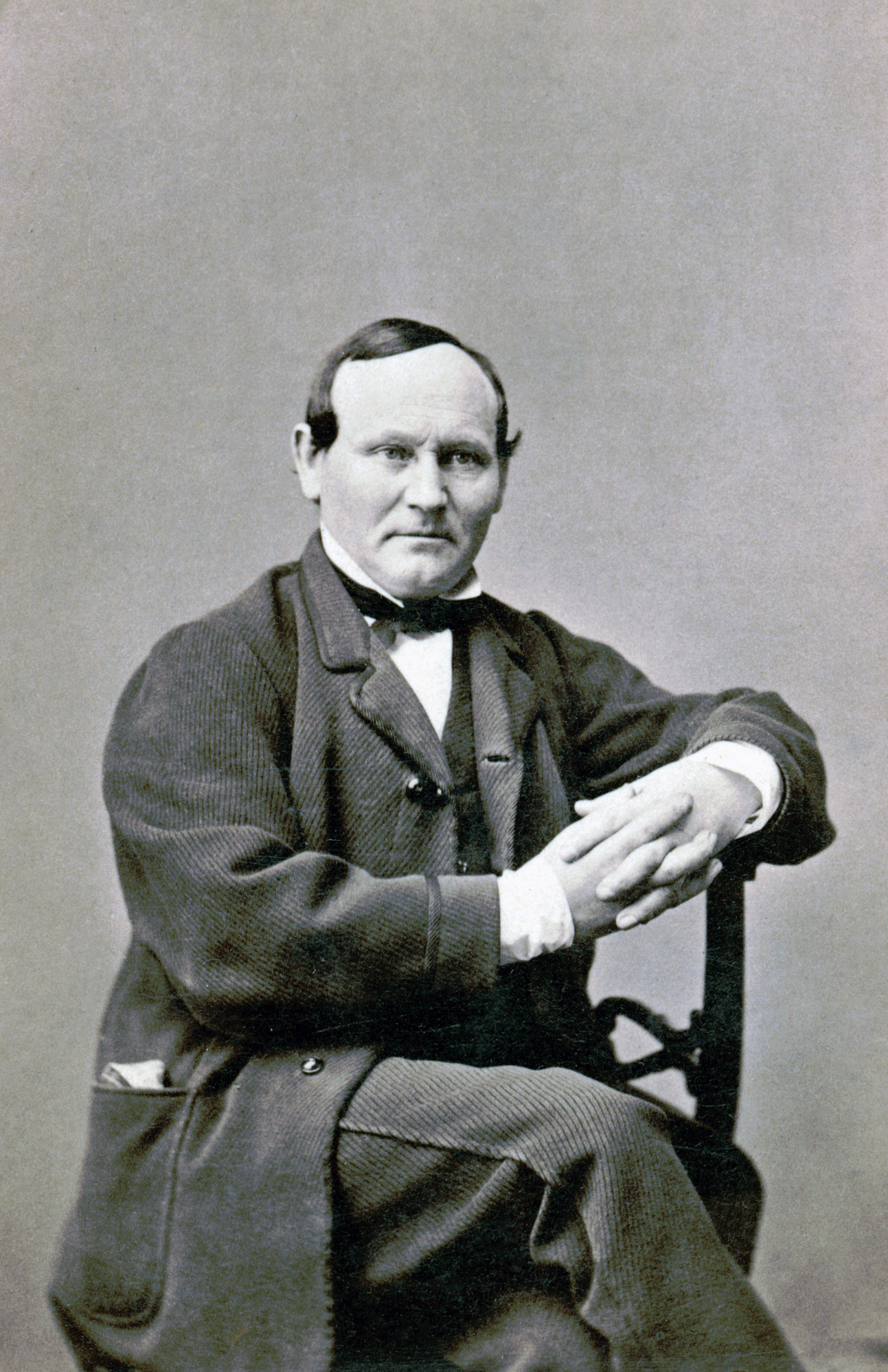 Johan Fredrik Lundgrén (pseud. Uller), skådespelare, teaterdirektör och författare 1863